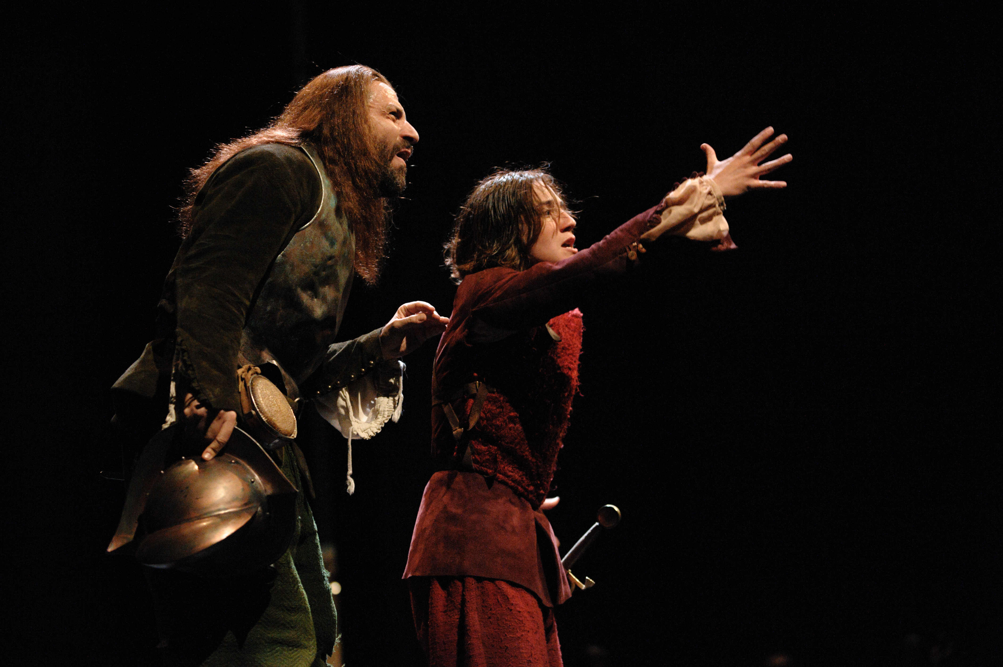 La vida es sueño. 35 edición del Festival de Teatro Clásico de Almagro. Datos de la obra Título: La vida es sueño Autor: Calderón de la Barca Versión: Juan Mayorga Dirección: Helena Pimenta Cía: Compañía Nacional de Teatro Clásico Foto: Guillermo Casas